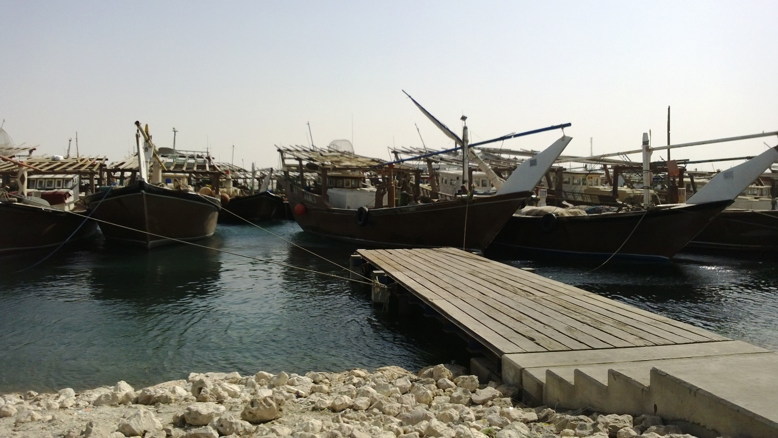 Al wakra Beach